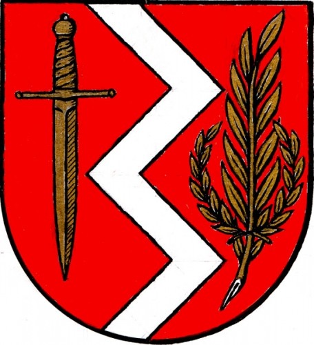 znak, Polom, okres Rychnov nad Kněžnou